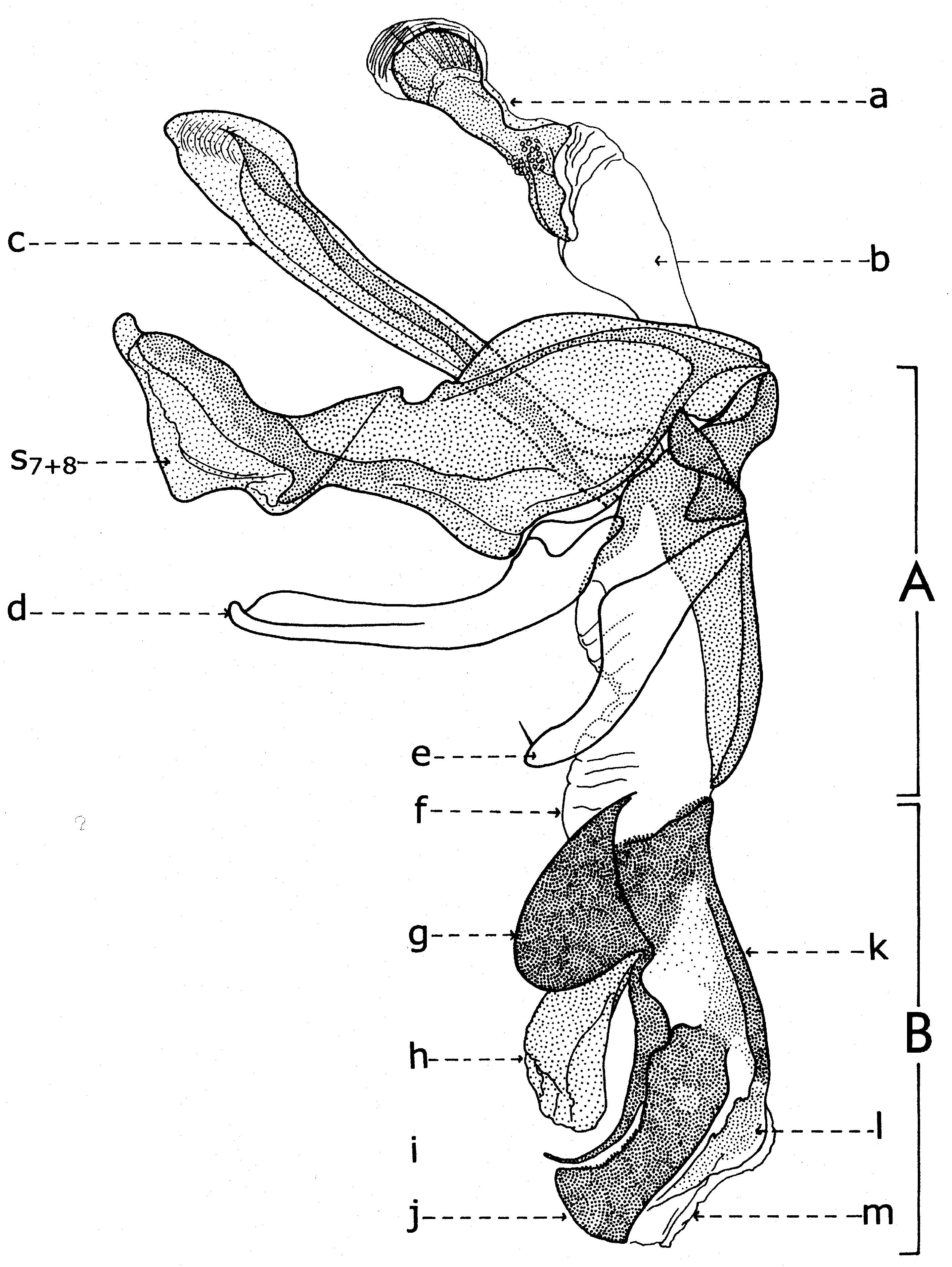 Fig. 13. Phallosome de Sarcophaga carnaria Bottcher, 1912.